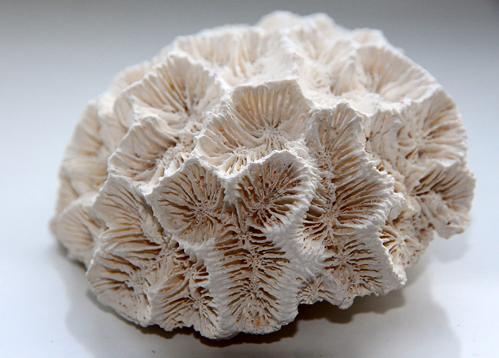 Коралл (Доминиканская республика)